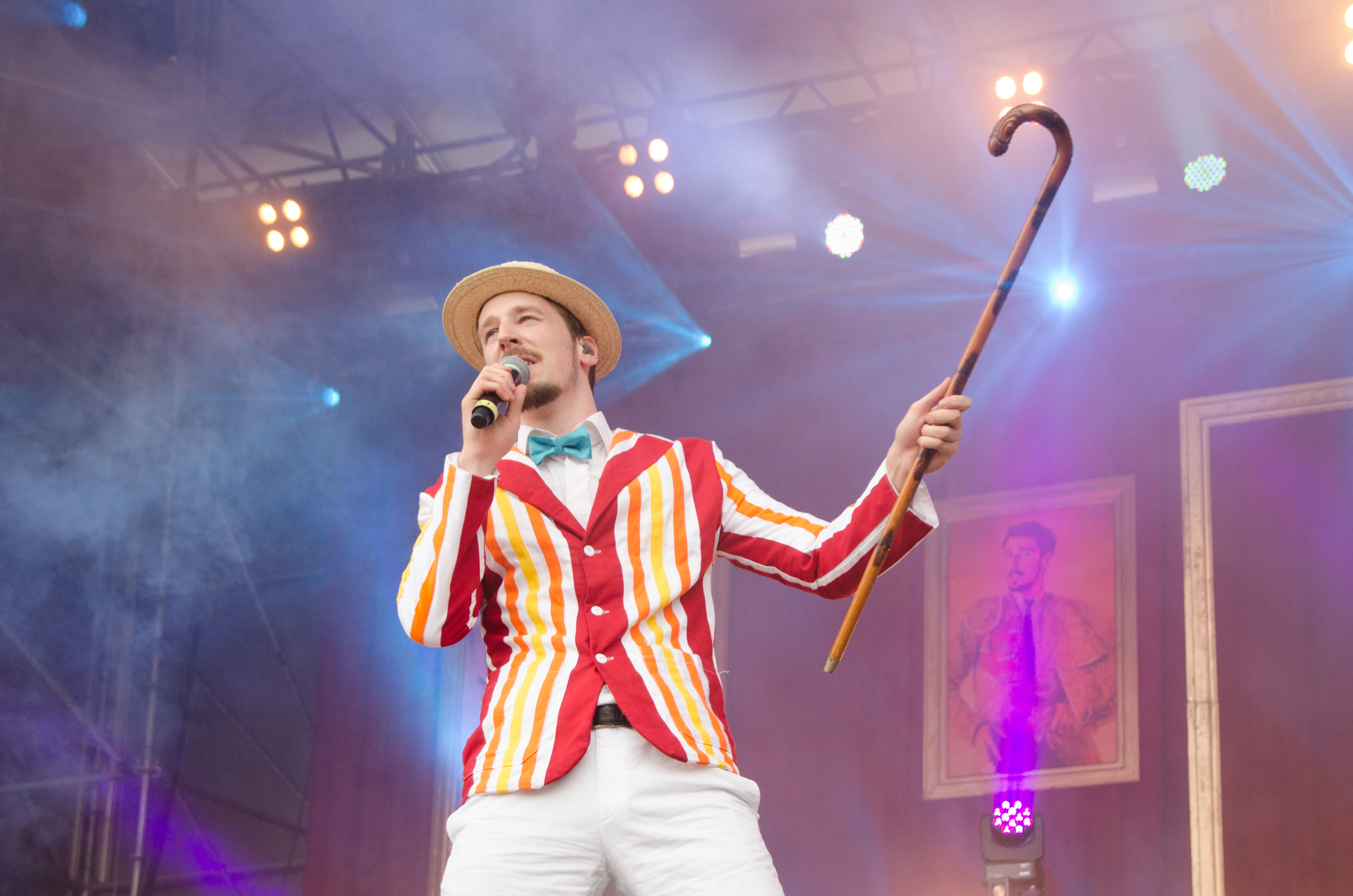 Alligatoah auf dem Kosmonaut Festival 2014 in Chemnitz Oberrabenstein. Auftritt Hauptbühne am Freitag, 27.06.2014.